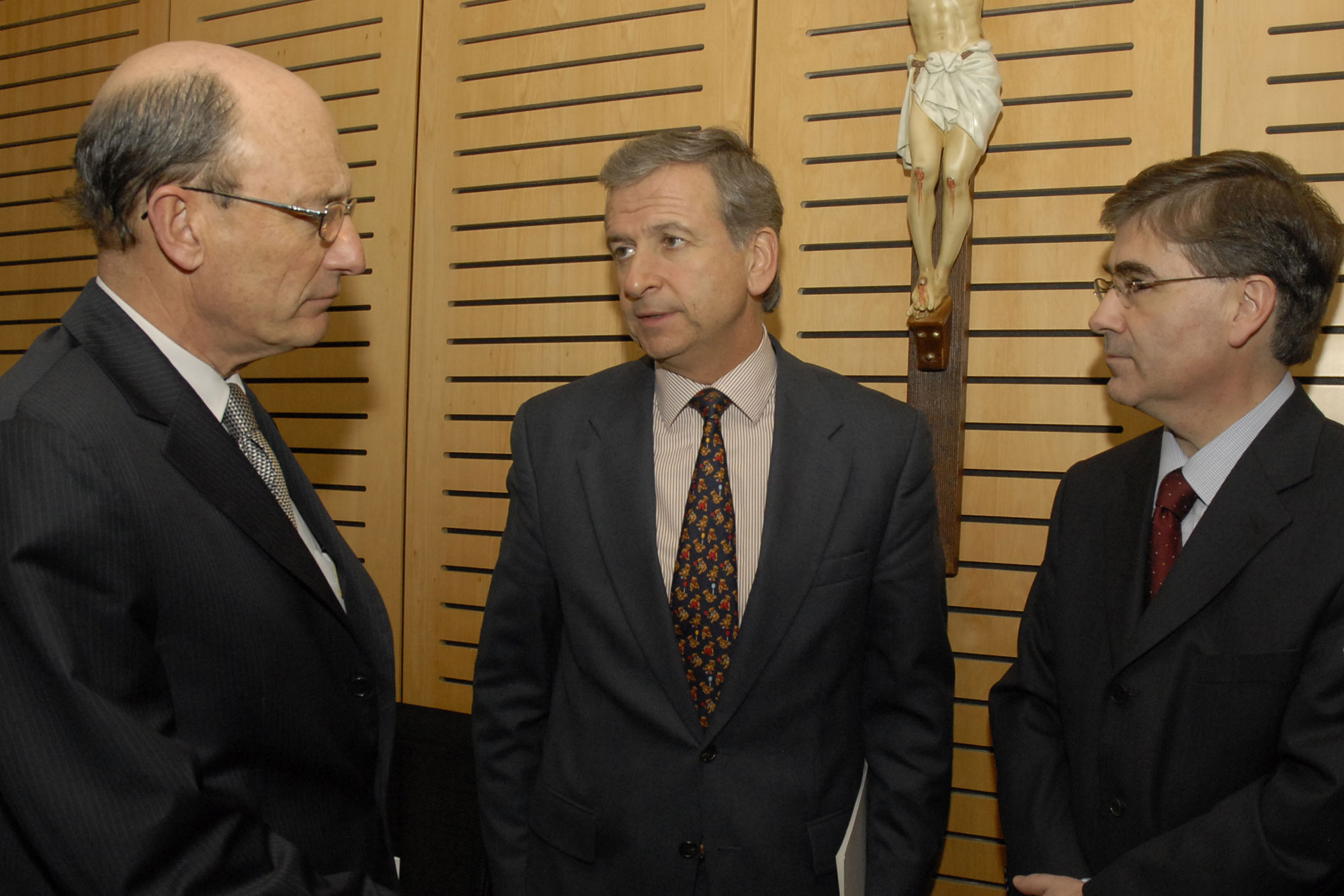 Juan Emilio Cheyre, Felipe Larraín, y Guillermo Marshall.